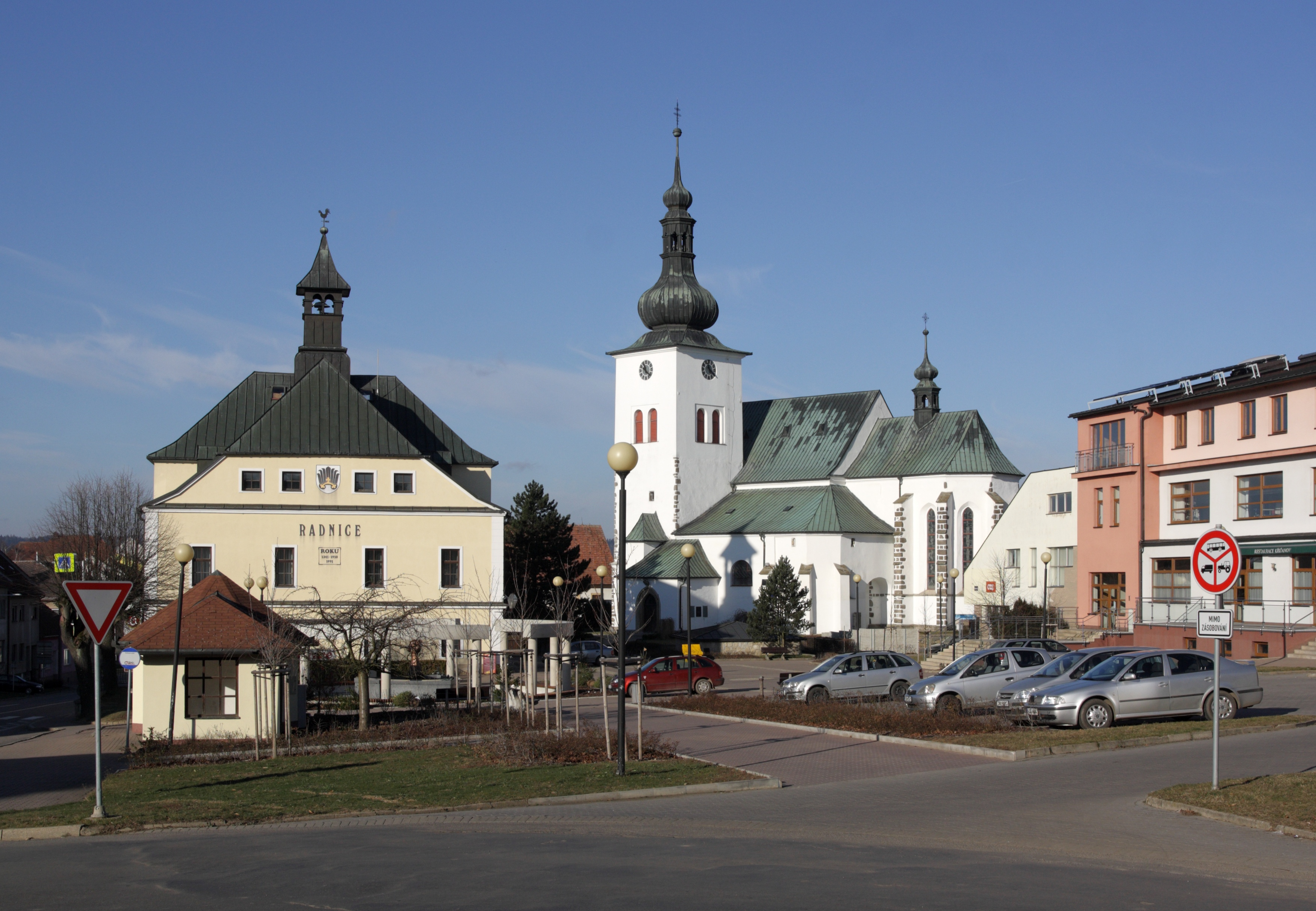 Křižanov (okres Žďár nad Sázavou) - Benešovo náměstí.